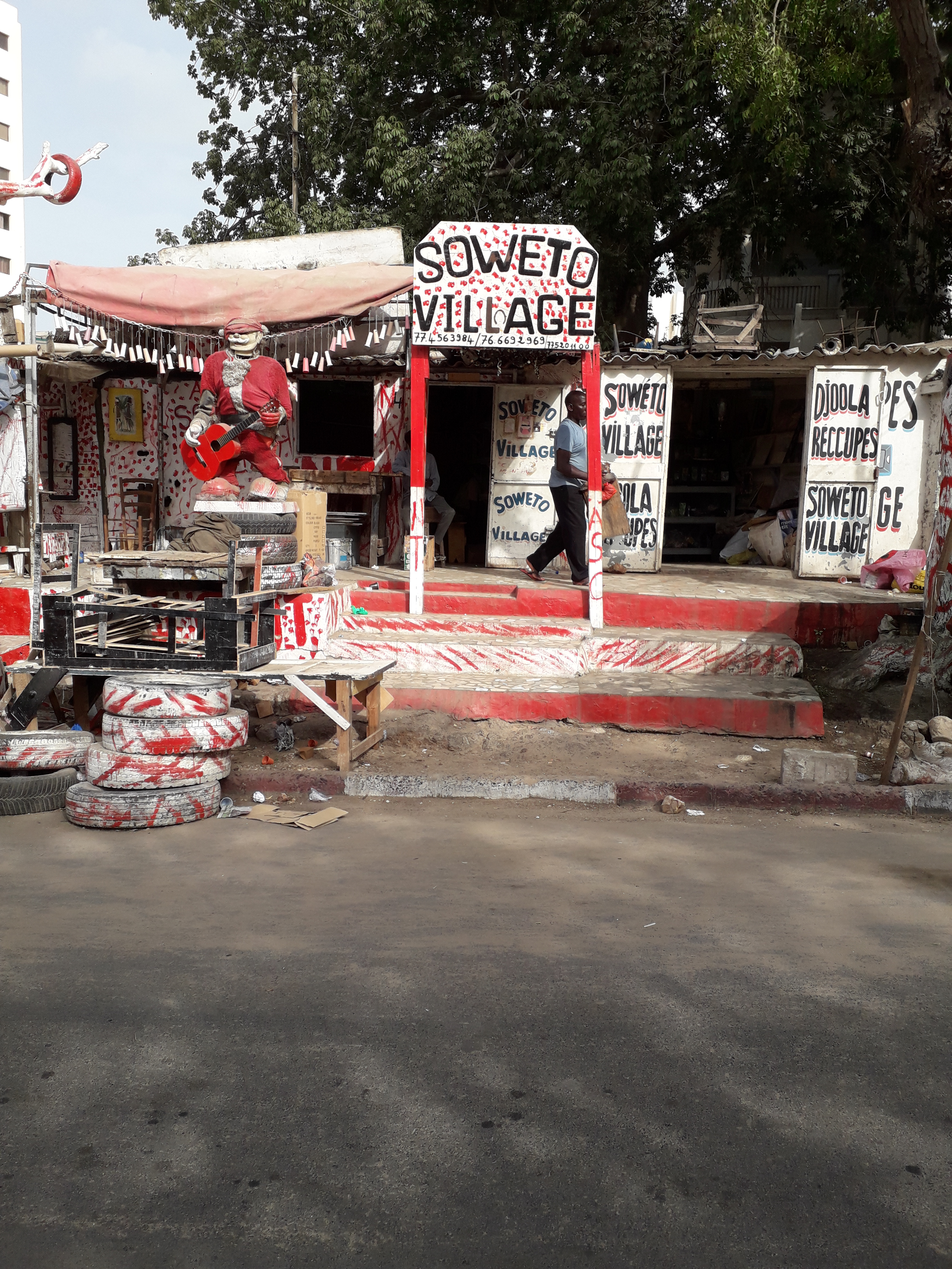 La devanture de l'atelier Soweto Village peinte aux couleurs de l'ASC Niayes Thioker